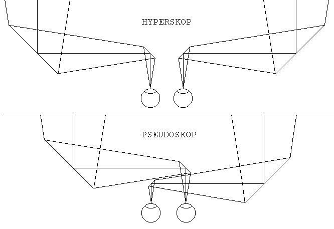 Hyperskop und Pseudoskop Beschreibung: Das Hyperskop vergrößert optisch den Augenabstand, was den Eindruck der räumlichen Tiefe verstärkt. Einige Entfernungsmessgeräte funktionieren nach diesem Prinzip. Das Pseudoskop vertauscht optisch die Positionen der Augen, was den Eindruck der räumlichen Tiefe umkehrt.